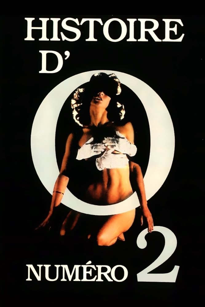 Image Histoire d'O Numéro 2